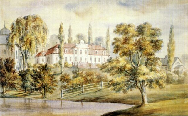 Палац Агінскіх в. Ручыца, Вілейскі раён, Мінская вобласць Акварэльны малюнак зроблены ў 1875—1877 гг., калі сядзіба належала Валенсу Ржавуцкаму. Беларуская (тарашкевіца): Палац Агінскіх у в. Ручыца, Вялейскі раён, Менская вобласьць. Акварэльны малюнак зроблены ў 1875—1877 гадох, калі сядзіба належала Валенсу Ржавуцкаму.